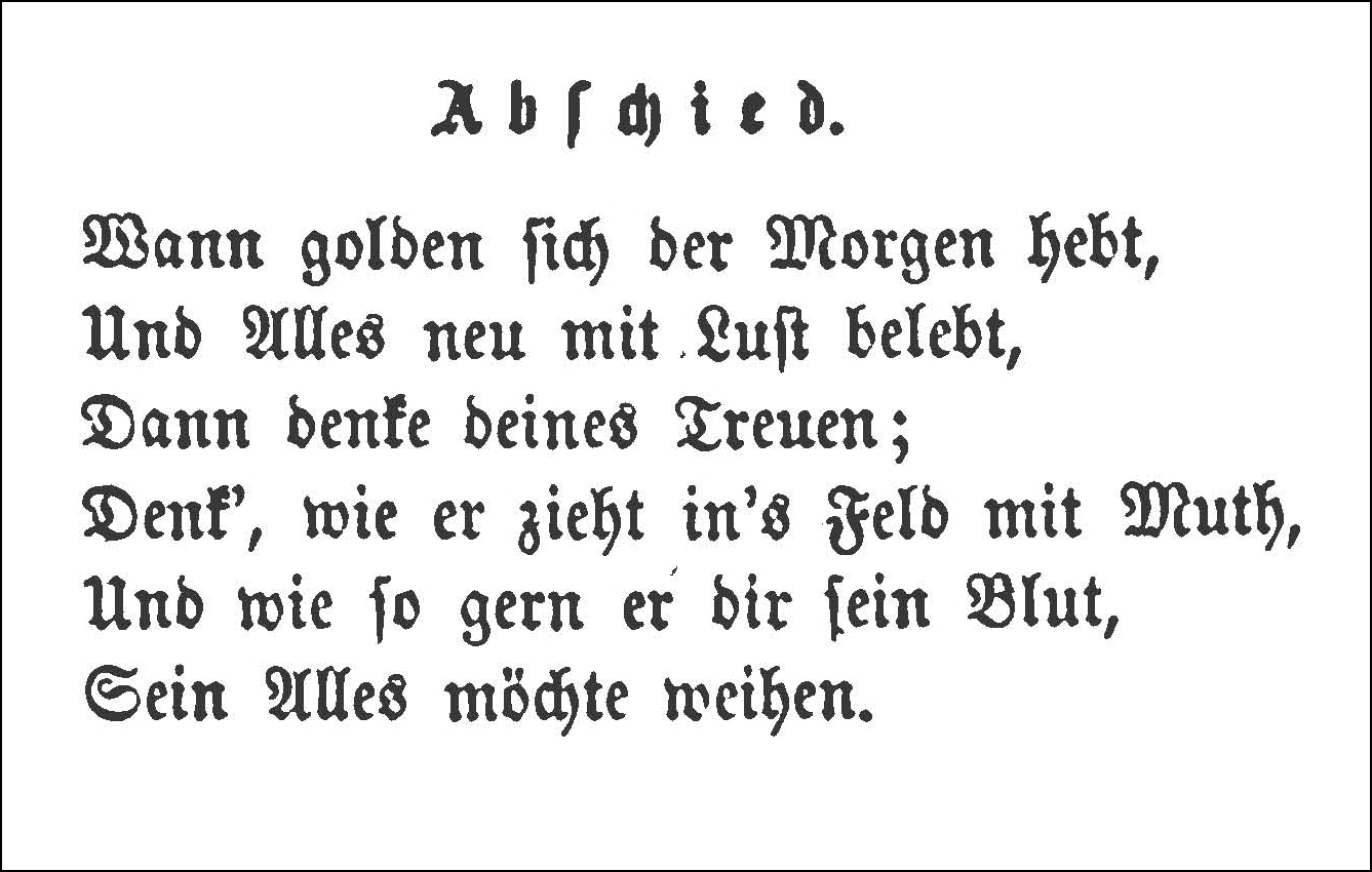 Anfang des Gedichts "Abschied" von August Mayer.